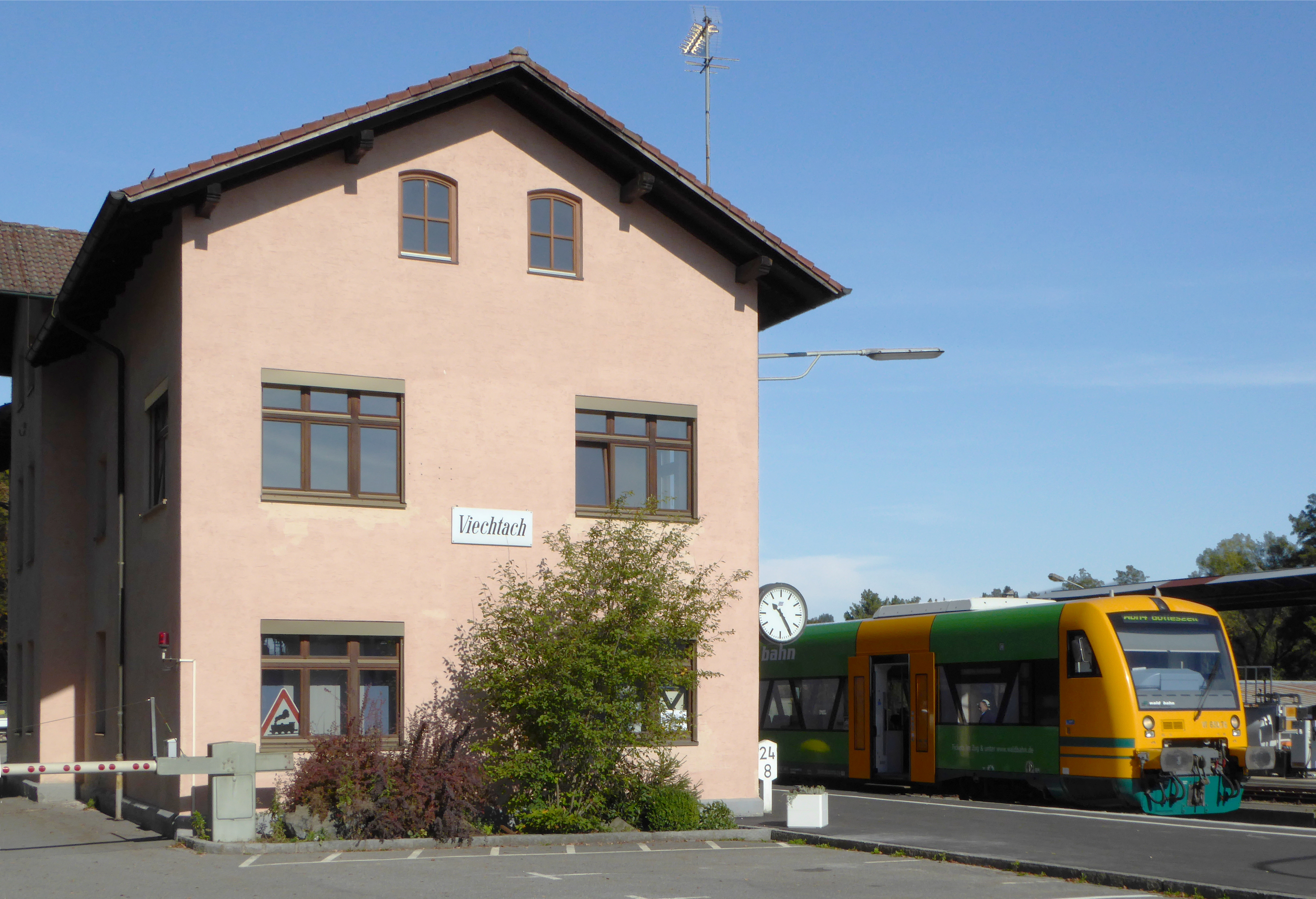 Bahnhof Viechtach mit Triebwagen Stadler RS1 (VT 650 78) der Bayerischen Waldbahn.